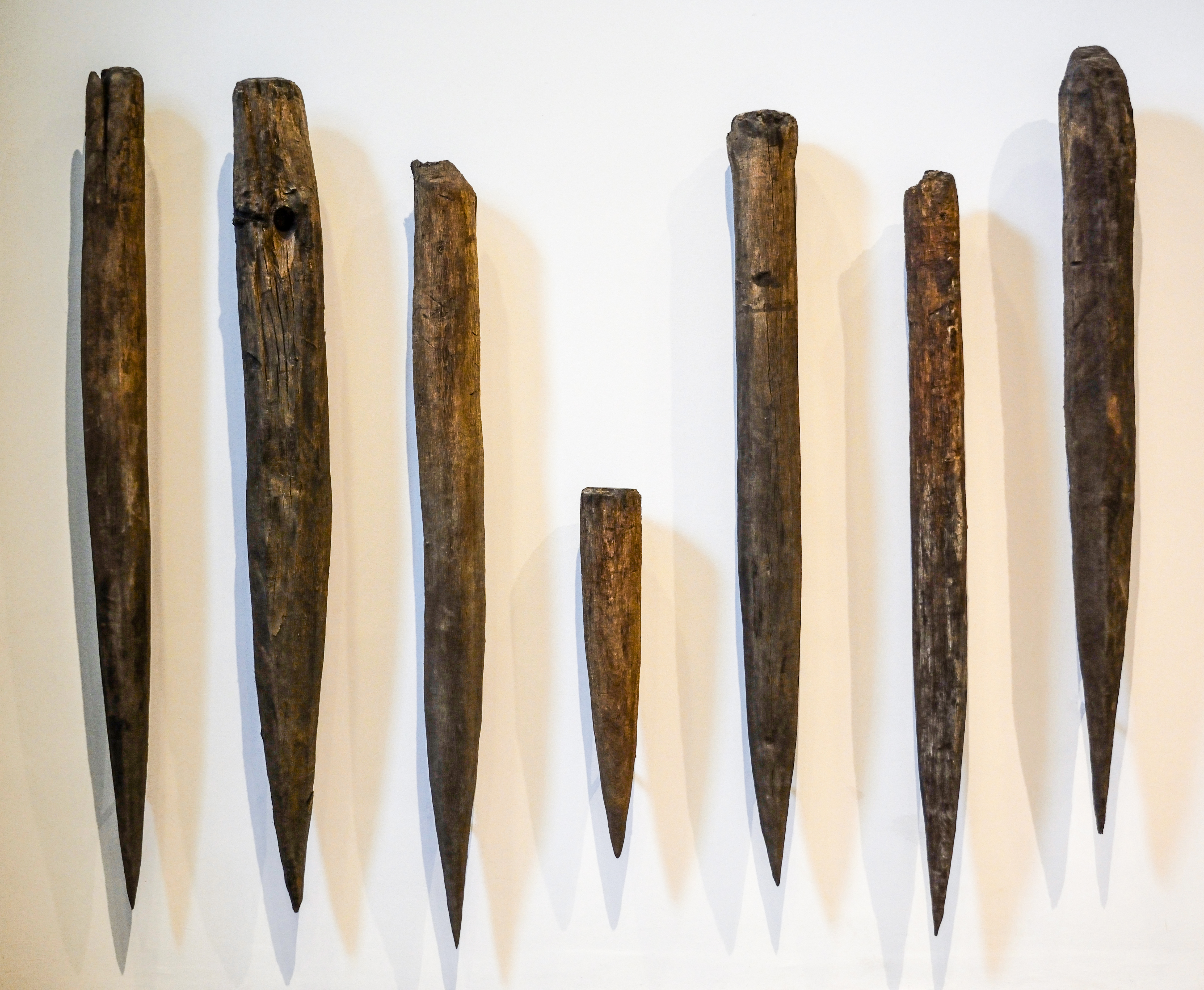 Impressionen aus dem LVR-Archäologischer Park Xanten Hier: Aufgefundene Gründungspfähle für das Fundament der Thermen